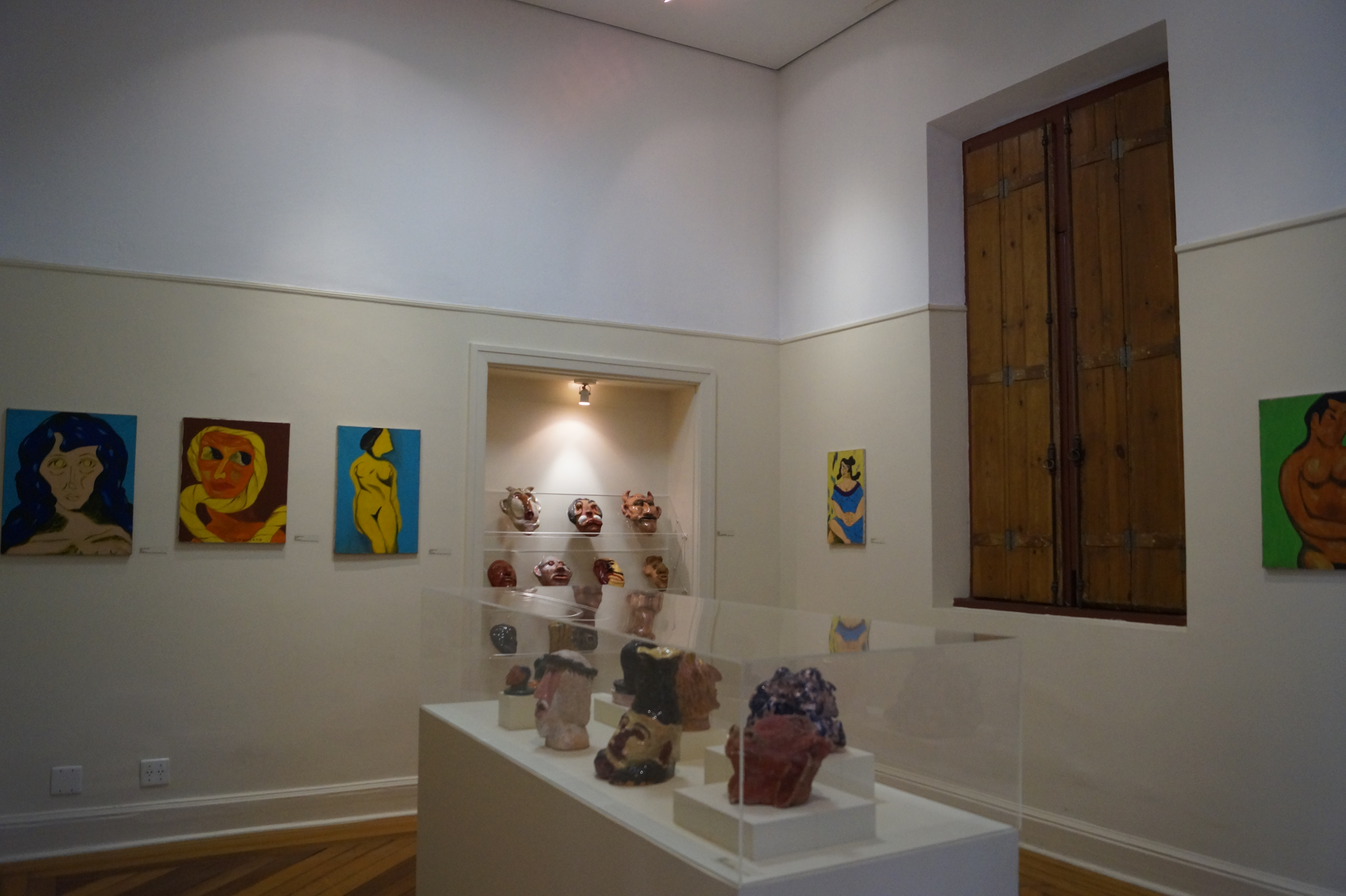 No andar de cima do prédio do Desinfectório Central (Bom Retiro - São Paulo - SP), localiza-se uma exposição com obras produzidas por pacientes do antigo hospital psiquiátrico do Juquery.